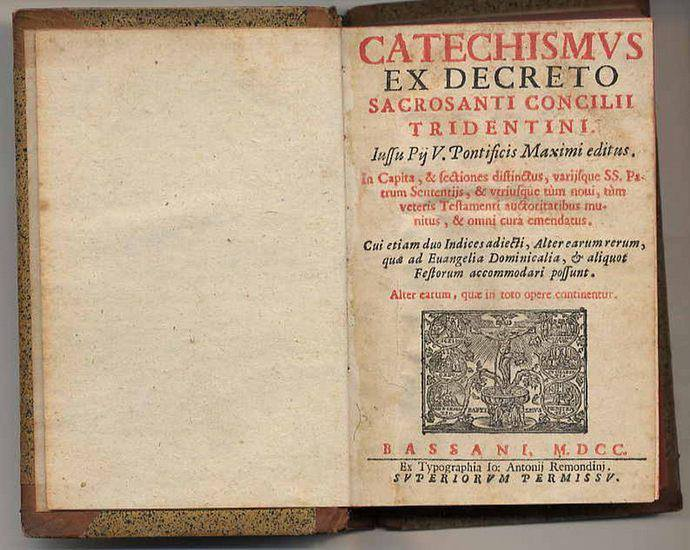 Catechismvs Ex Decreto Sacrosanti Concilii Tridentini